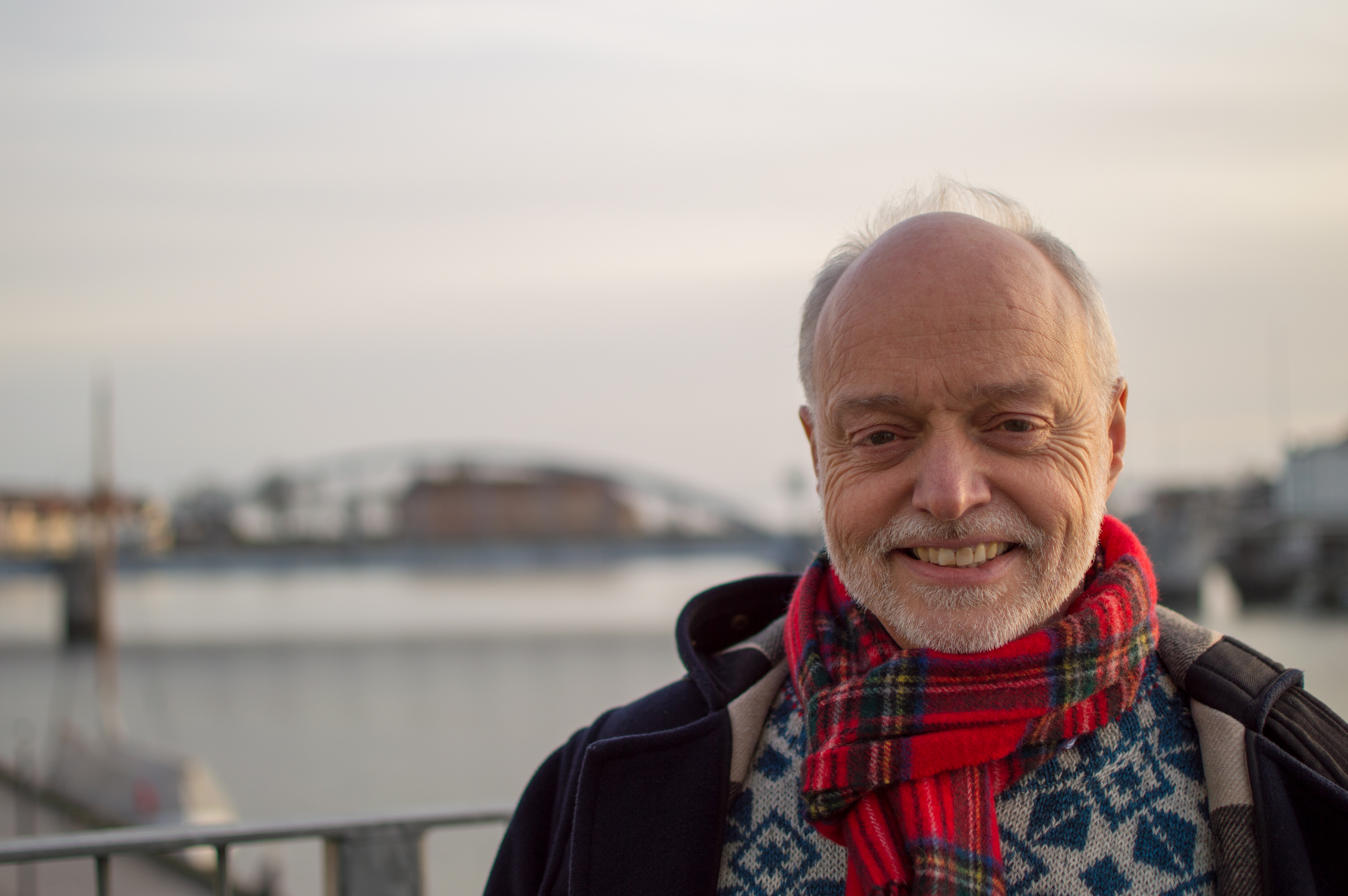 Nils Sjøberg, 2019